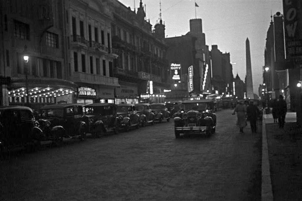 Vista hacia el oeste de la Avenida Corrientes desde su intersección con Maipú, Buenos Aires, en 1936.